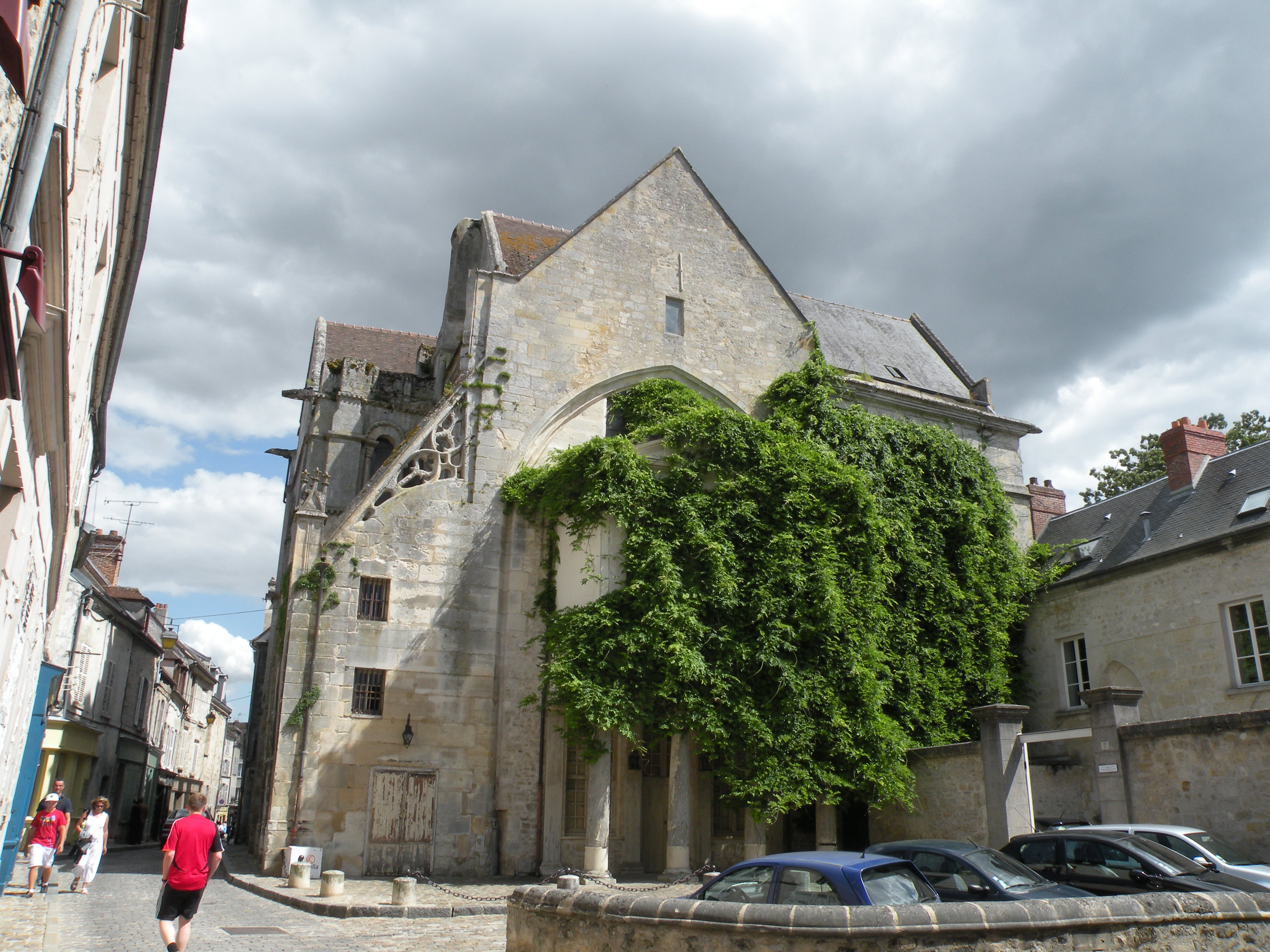 église saint Aignan 1029 senlis